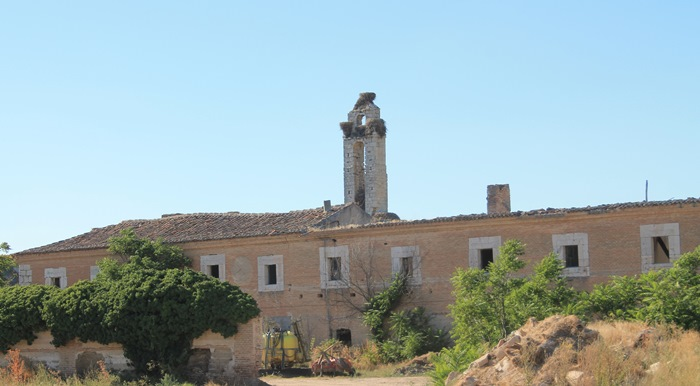 La cartuja de Aniago, en el término de Villanueva de Duero, se alza junto al lugar en el que el Adaja se une al Duero. Antes de su desamortización en 1835, el general francés Kelleman (algo así como el gobernador militar de Valladolid) mandó habilitar una escuela gratuita para los pobres.